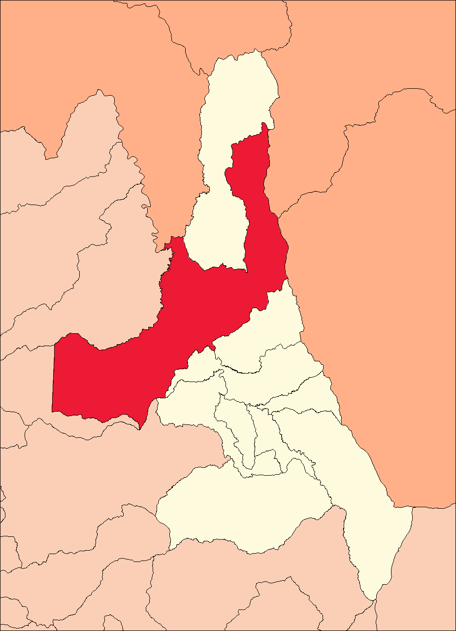 Área del distrito de José Crespo y Castillo.